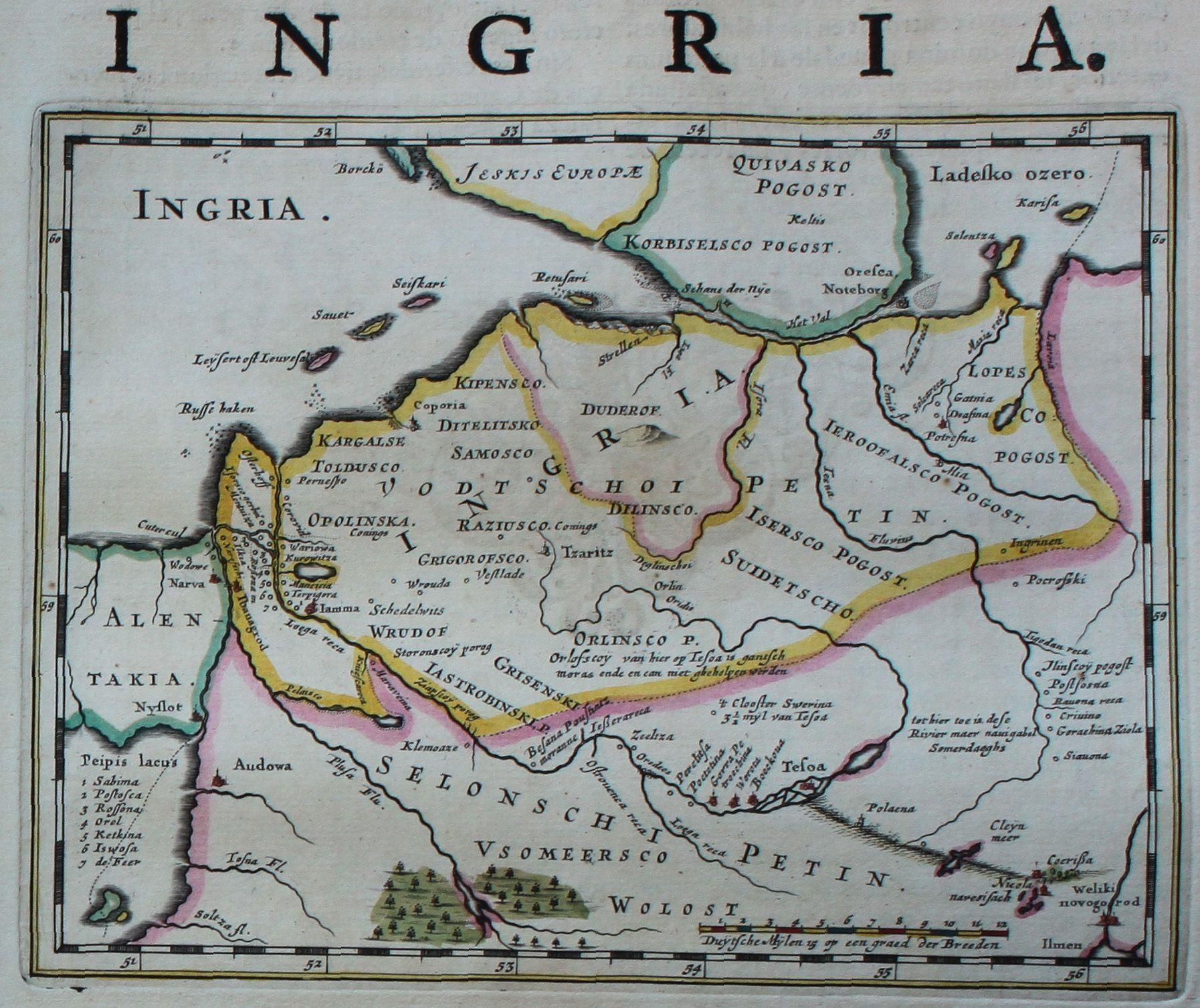 Descripción bibliográfica: Geographia Blaviana. - [Amsterdam : Juan Blaeu, 1659] . - [32], VI, 96 p., 34 f., h. 35a, 35b, 35c, 35d, 36-44 f., 34, [2], 36-40, [2], 43-70 [i. e. 75], [1] f., [20] p. de map., [9] f. de map., [4] f. pleg. de map., [2] f. de plan., [2] f. ge grab. : |bil. ; |cFol. marca major (57 cm.) . - En la dedicatoria a Felipe IV: "Presenta ... El Atlas Universal y Cosmographico de los orbes y terrestre ... Juan Blaeu" . - Título tomado del frontispicio. -- Privilegio fechado en 1659. -Errores de pag. - Sign.: 1, *2, **3, ***-****2, a-e2, A-I2, K1, L-Z2, Aa-Dd2, 4 2, Ee-Ff2, A-I2, K1, L2, M1, N-Y2, Z5, Aa-Dd2, Ee1, A-D2, E-F1, G-I2, K-L1, M-O2, P1, Q-Z2, Aa-Bb2, Cc1, Dd3, Ff-Zz2, Aaa-Bbb2, . - Frontispicio grab. col. -- Incluye un total de 49 il. entre map., plan. i grab. Materia: Atlas - Obras anteriores a 1800 Impresor: Blaeu, Joan, 1596-1673, imp. Lugar de impresión: Holanda. Amsterdam Localización: Vea la ilustración en su contexto Visite también la exposición "Cartografía histórica en la Biblioteca de la Universidad de Sevilla"